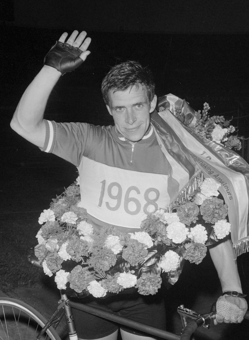 Henk Nieuwkamp, kampioen op de op de 50 km zonder gangmaking amateurs, tijdens de Nederlandse baankampioenschappen 1968